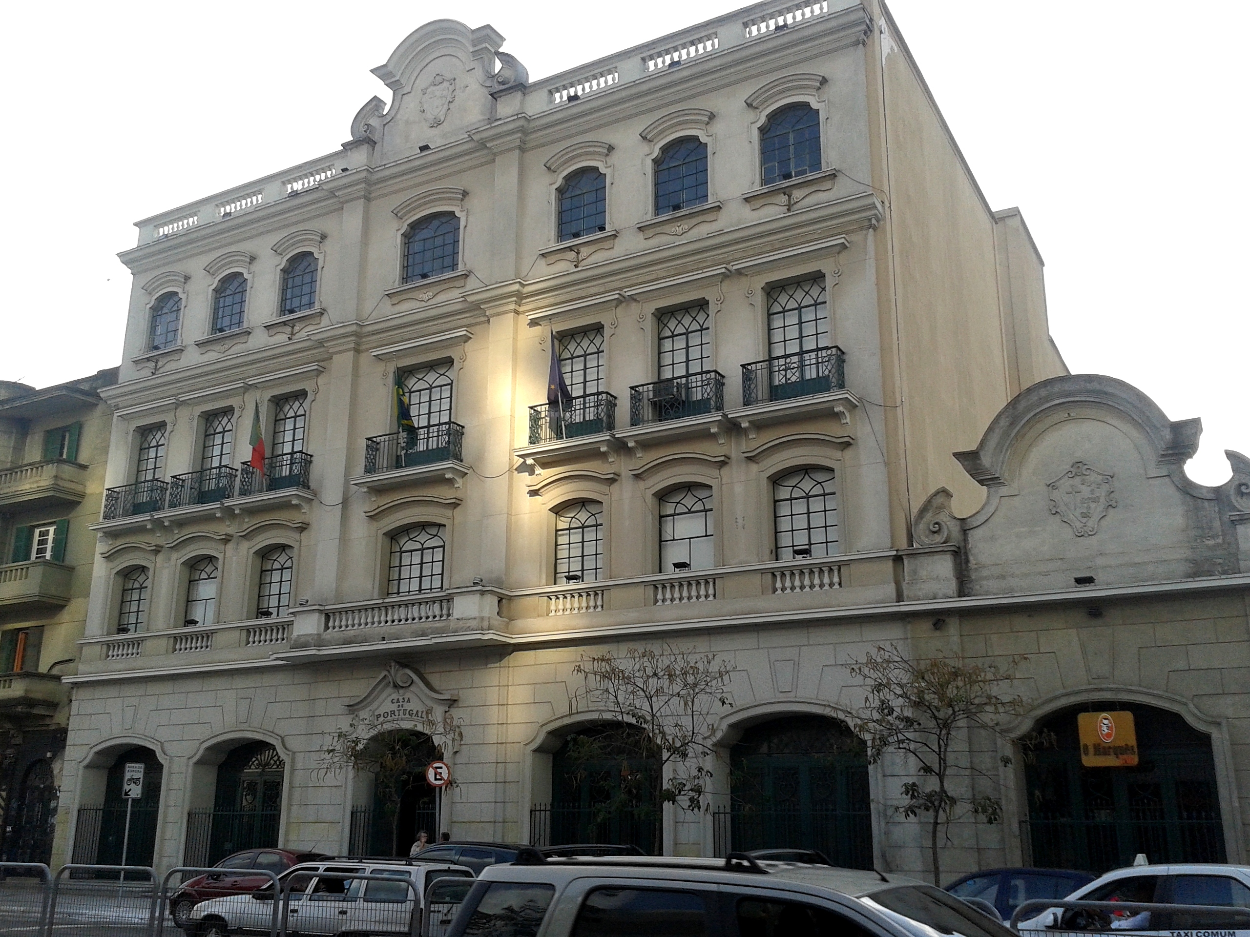 Casa de Portugal, no distrito da Liberdade, São Paulo, SP, Brasil.